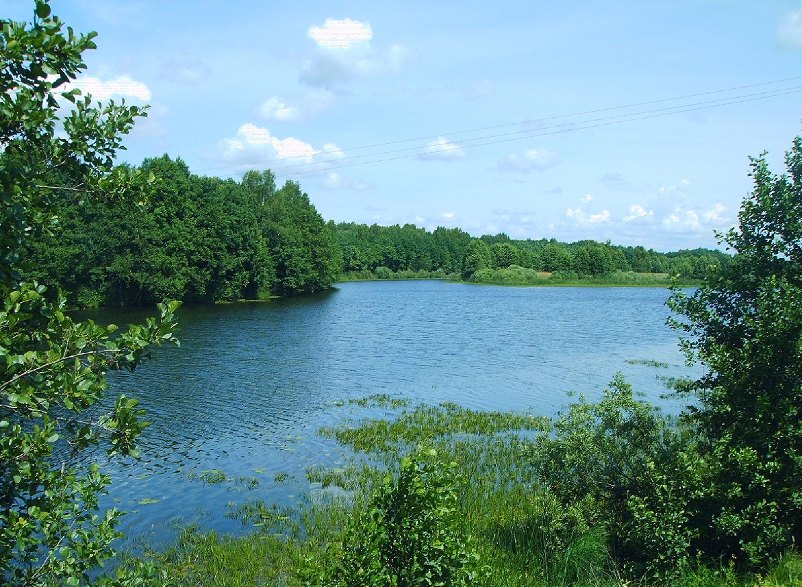 Озеро Шелубей в Теньгушевском районе Республики Мордовия (Россия). Является особо охраняемой природной территорией республики.